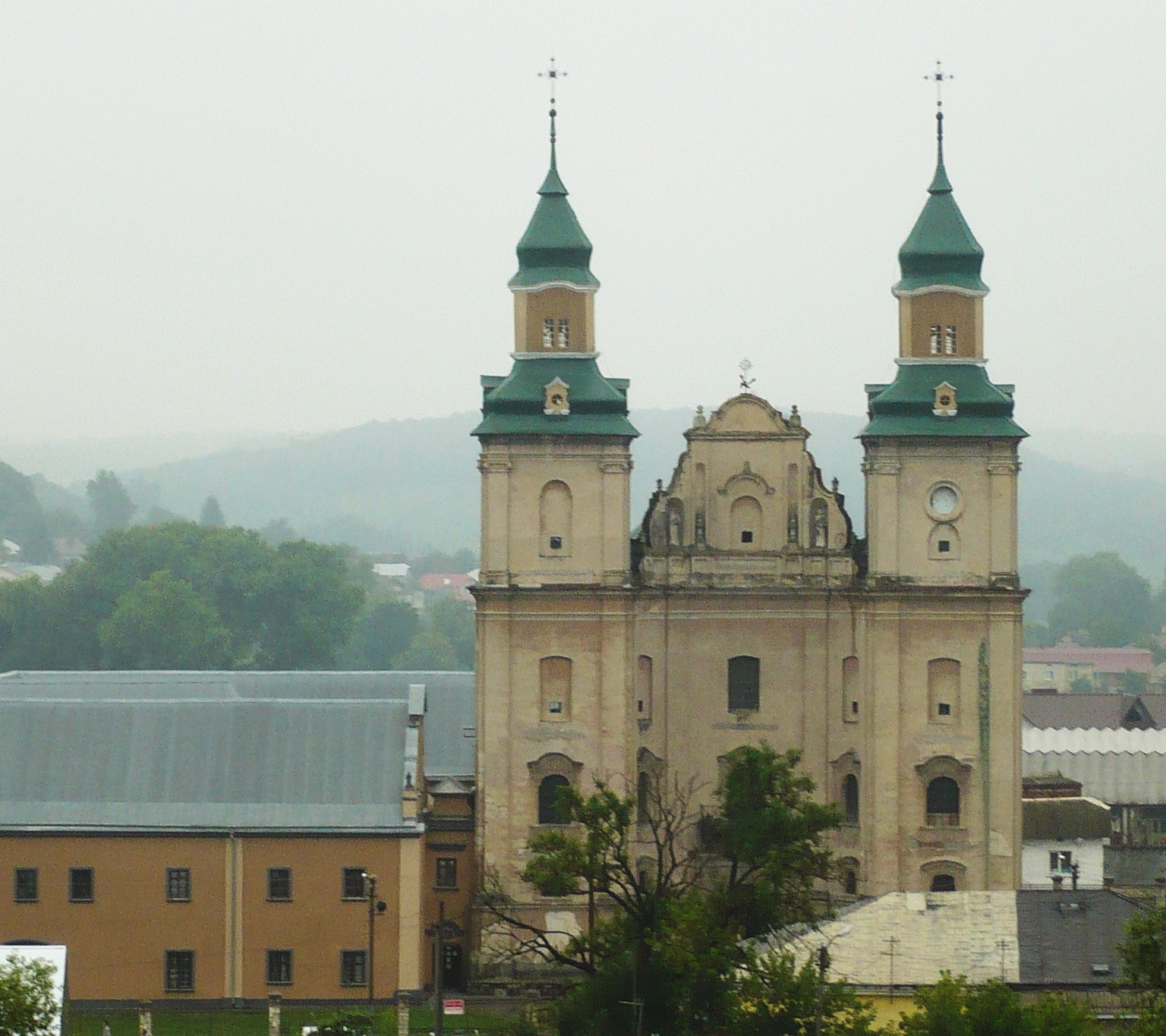 Zbaraż, kościół oo. bernardynów